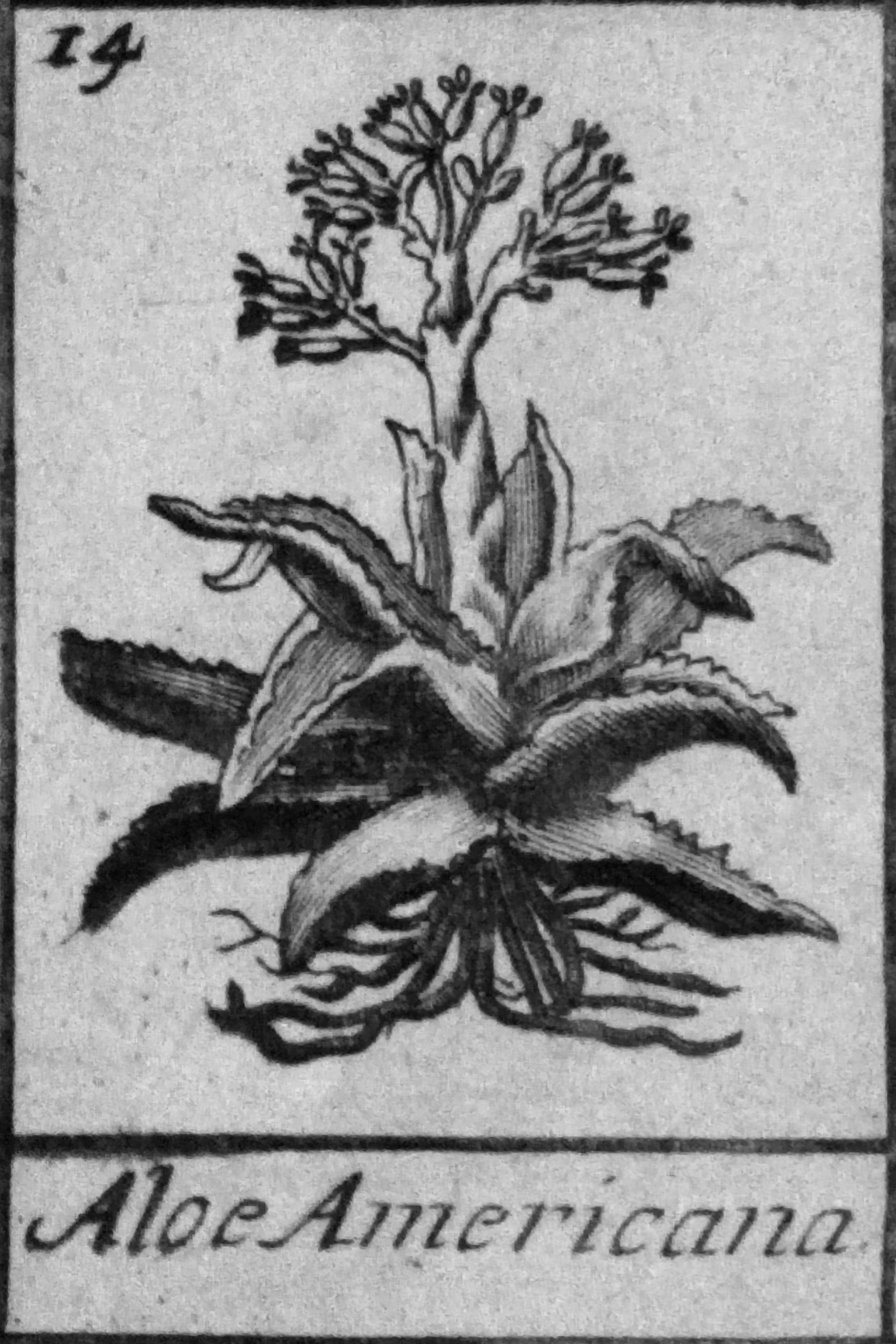 Estratto dalla Tab. 1 del "Trattato Universale delle droghe semplici" di Nicolas Lémery - Parigi 1732